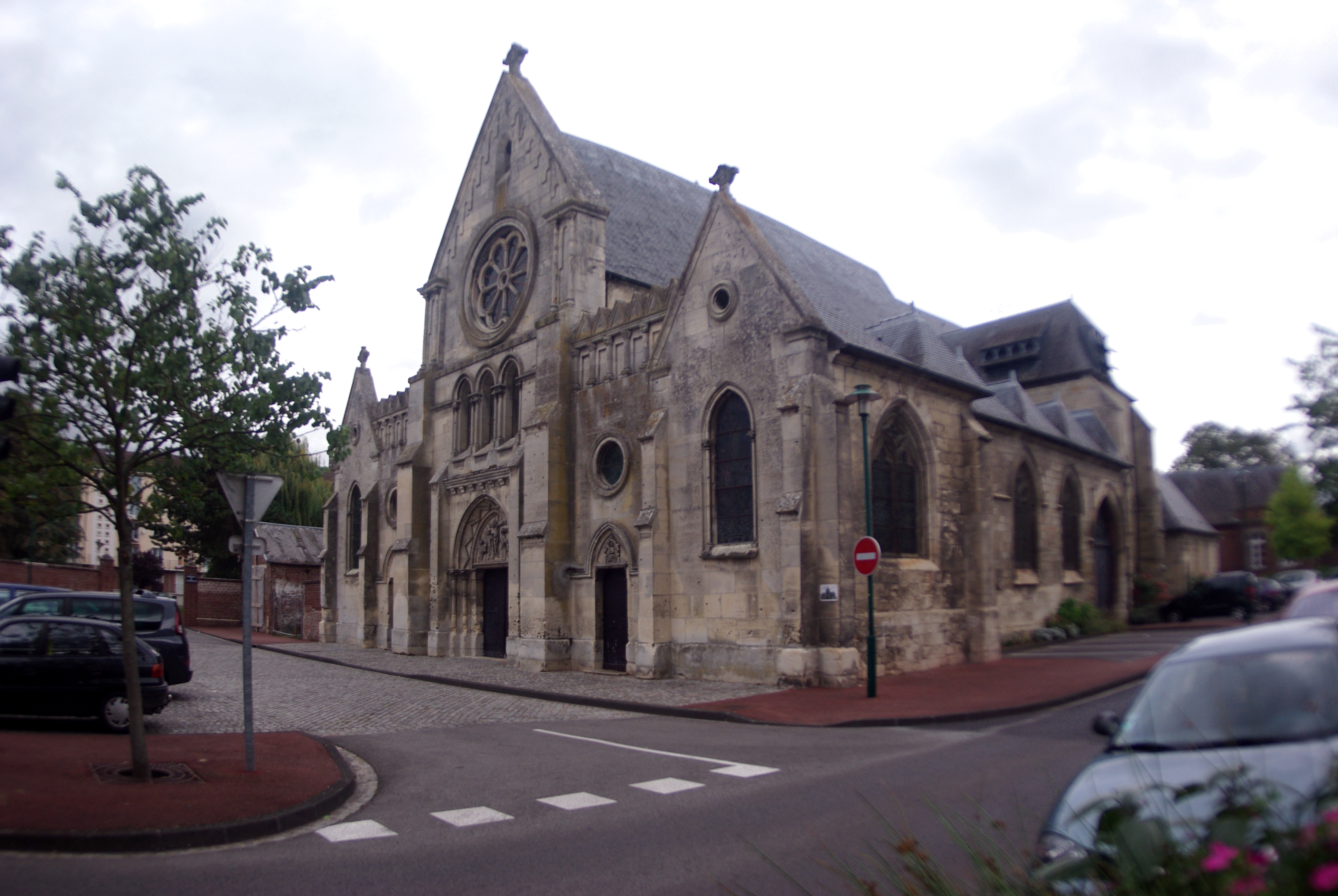 Église Saint-Montain. .